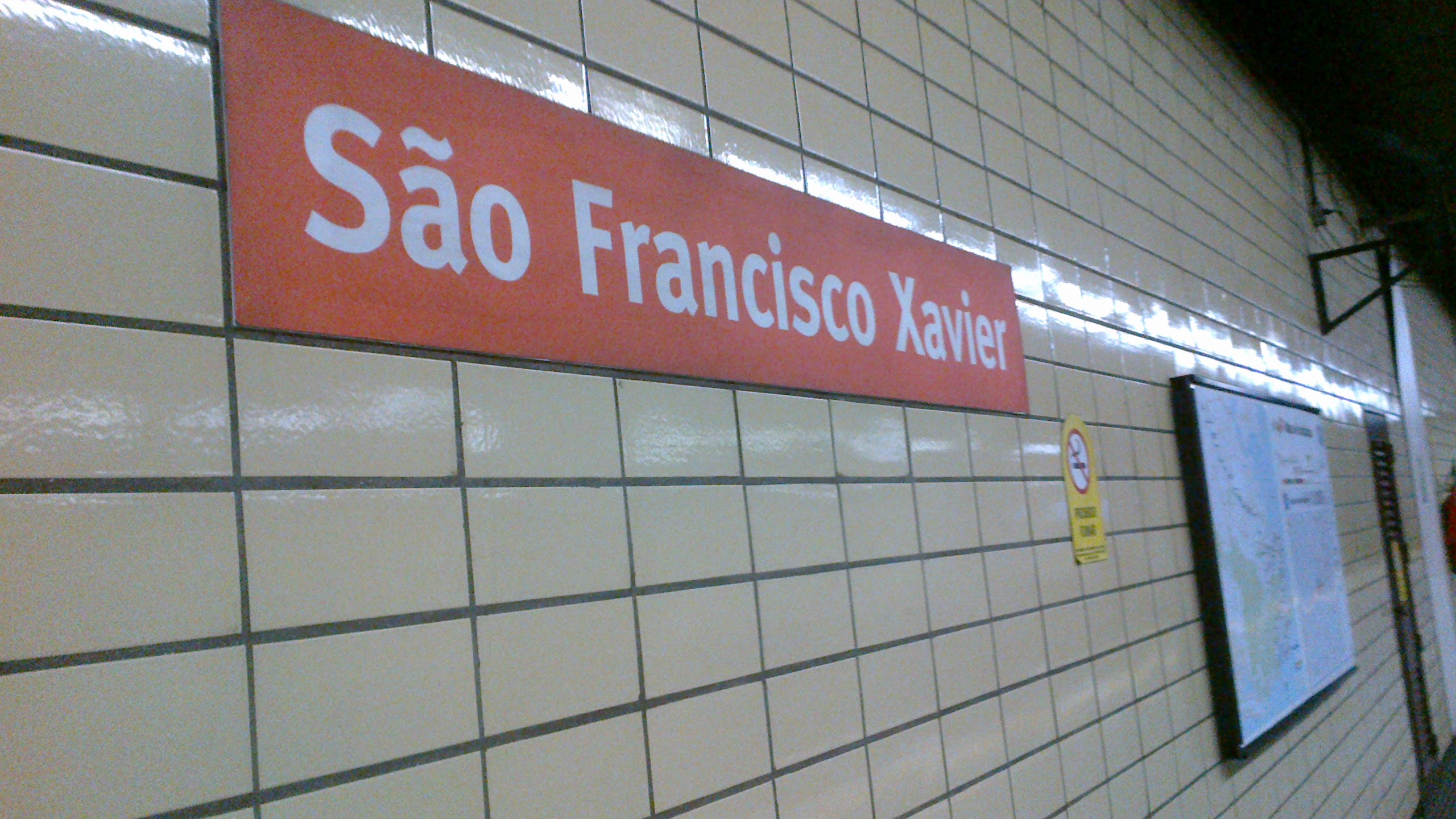 Estação de Metrô São Francisco Xavier, na Tijuca, Rio de Janeiro.